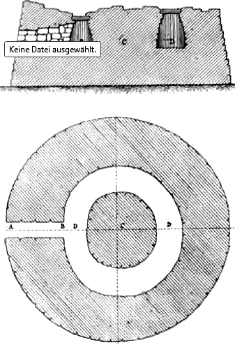 Montefí, südöstlicher Talayot: Grundriss und senkrechter Schnitt. Ciutadella, Menorca